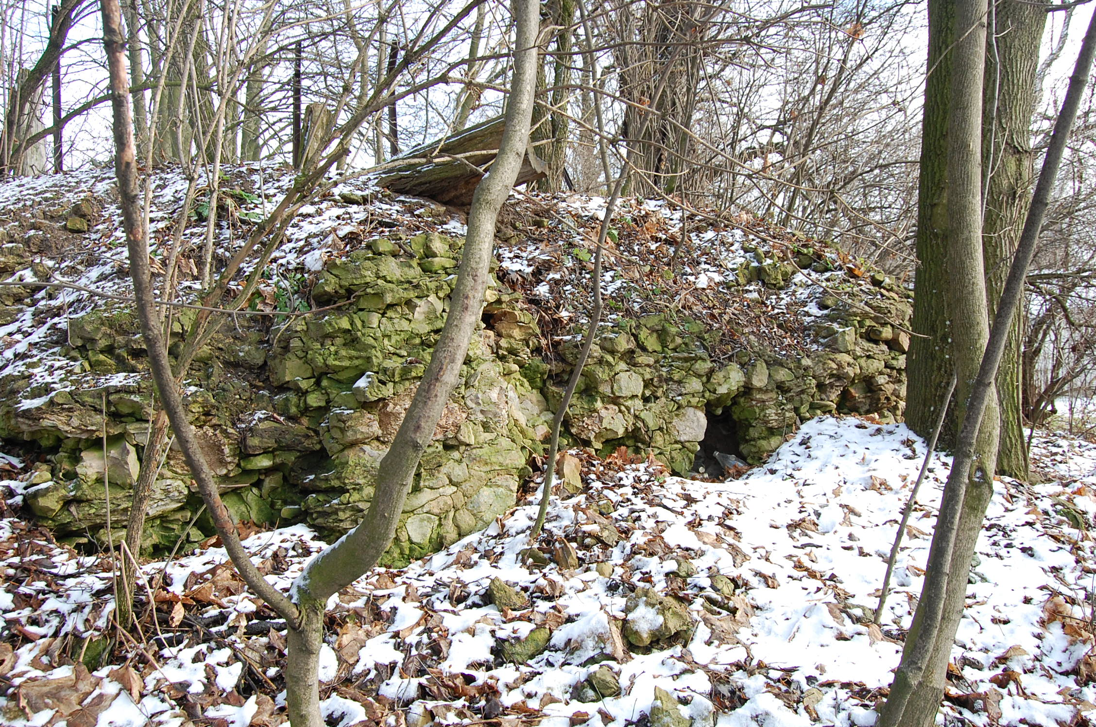 Fundamenty starego kościoła w Konopnicy